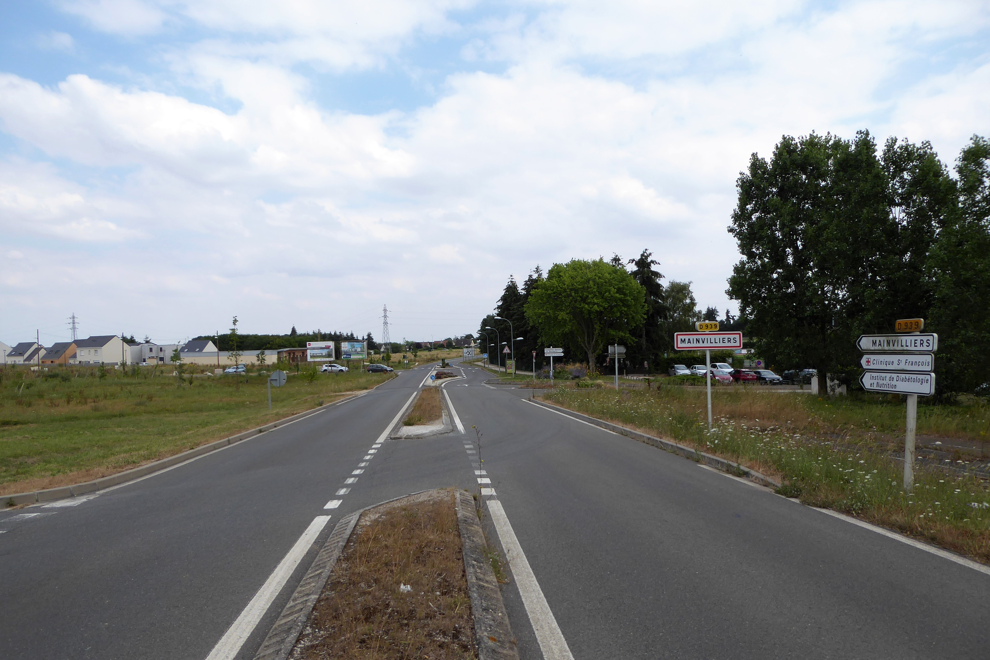 La route départementale 939, à l'entrée de Mainvilliers en provenance de Châteauneuf-en-Thymerais, Eure-et-Loir, France.